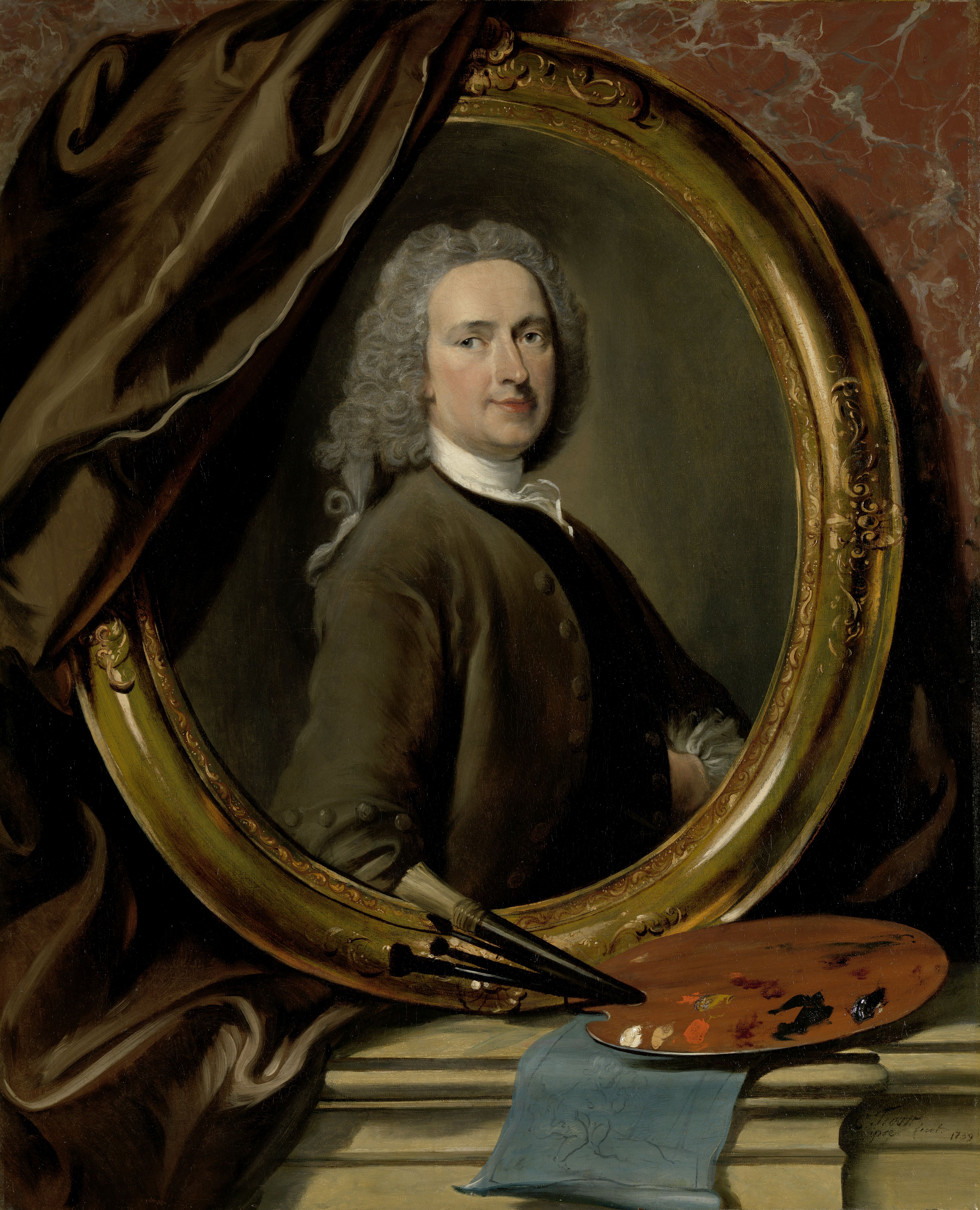 Zelfportret van Cornelis Troost, buste in een geschilderde ovale omlijsting, de linkerhand in de vest gestoken. Een gordijn hangt deels over het portret; vooraan op een voetstuk liggen een palet met verf en penselen en een tekening op blauw papier.; Cornelis Troost (1696-1750), olieverf op doek, 1739